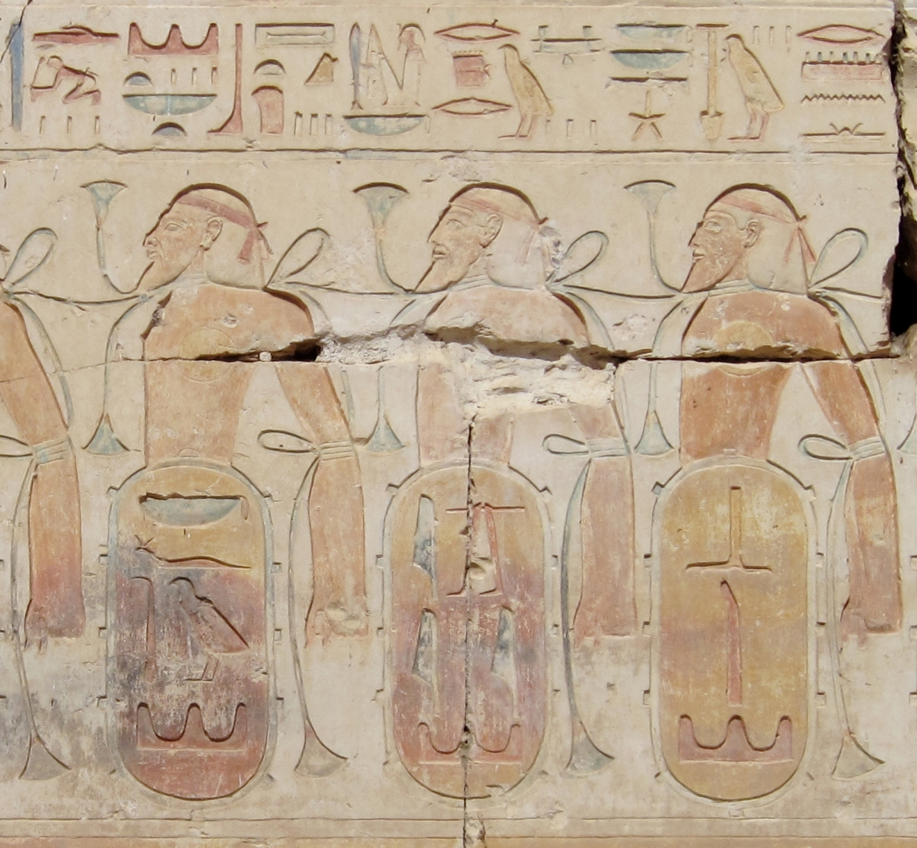 Detail der Nordwestwand neben dem Eingang zur Kapelle Ramses II. im Tempel Ramses II. in Abydos, Ägypten